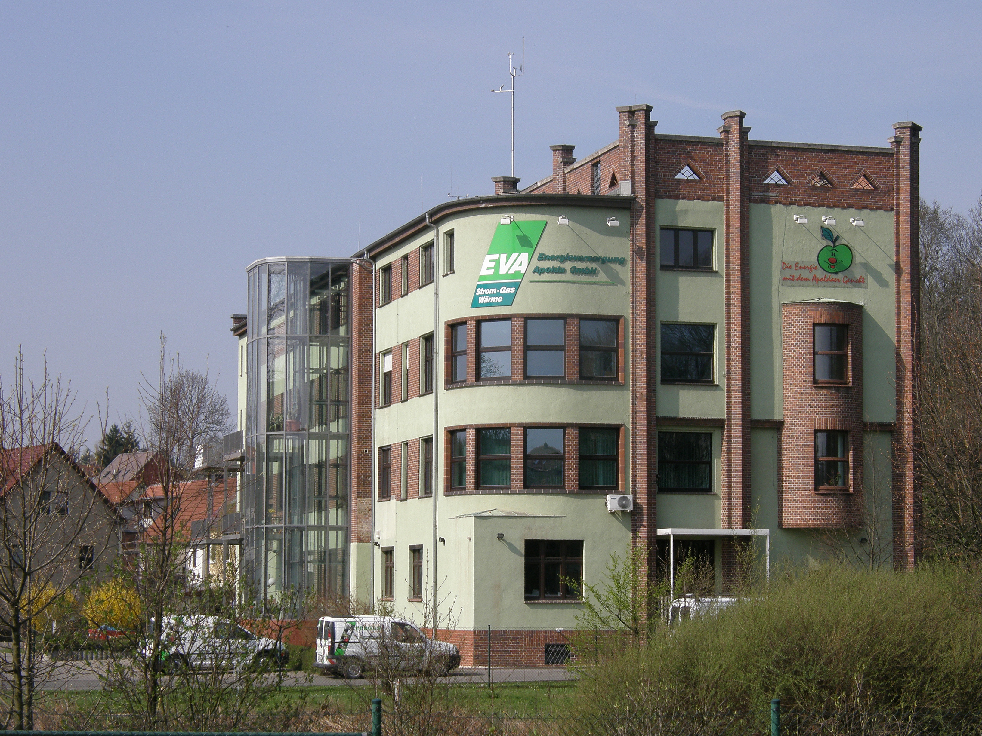 Stadt Apolda - EVA Gebäude Rückseite